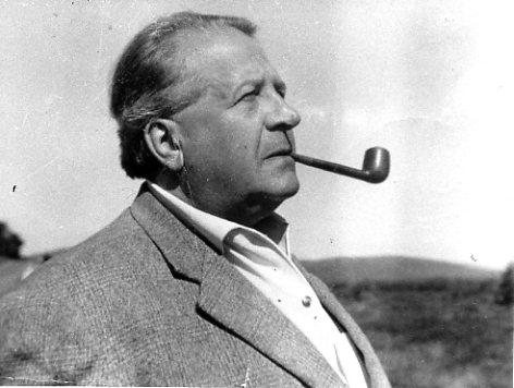 photoLupasco